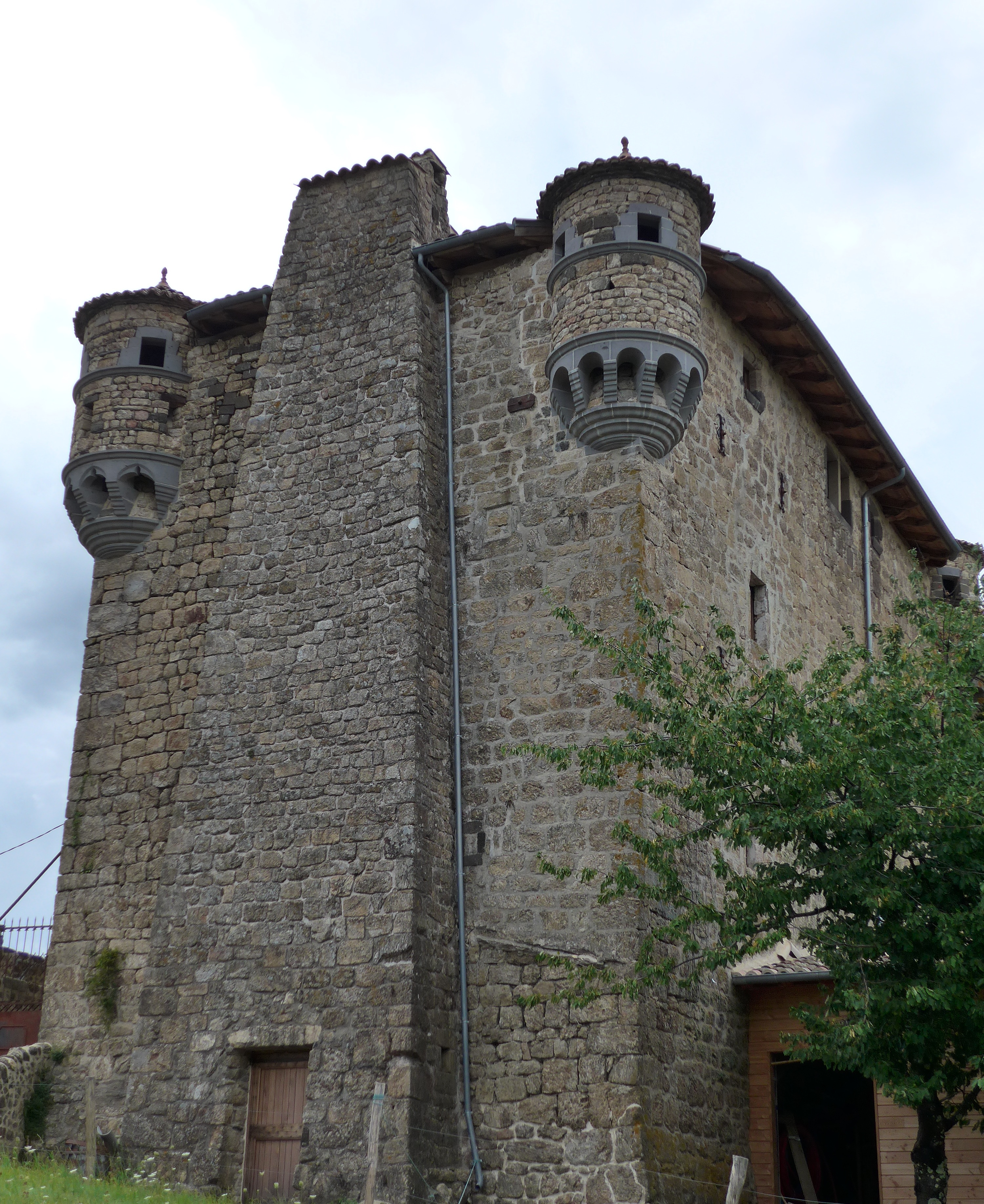 Château de Hautségur surplombant la haute vallée de l' Ardèche,il date du 11° siècle.Partiellement détruit lors des guerres de religion, il fut reconstruit au 16°. A l'origine le château était une tour de guet déportée de quelques centaines de mètre du château de Ventadour. Aujourd'hui propriété privée il peut se visiter à certaines périodes.